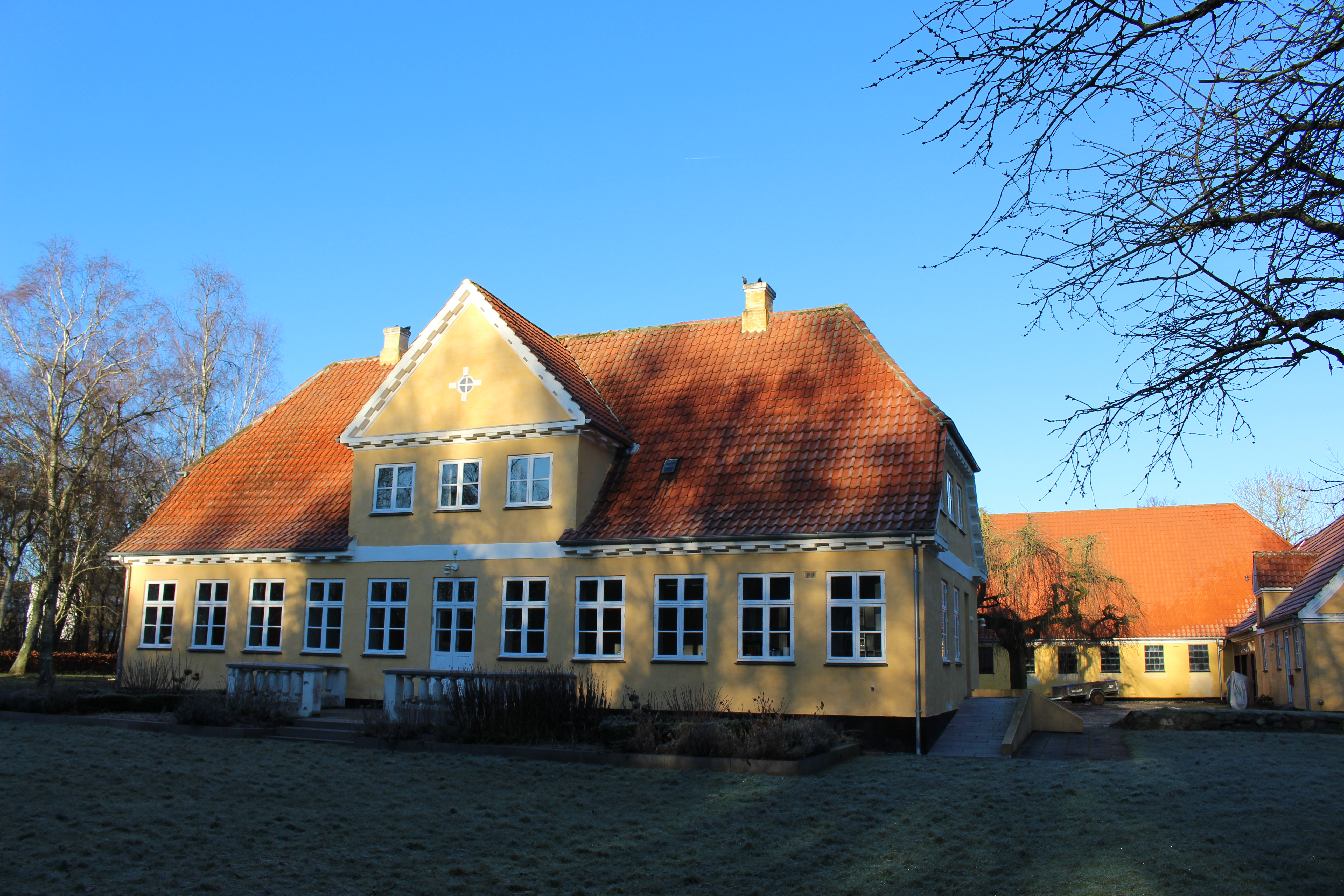 Birkelundgård i Albertslund